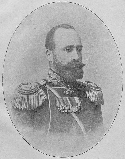 Полковник Сергей Иванович Кутепов.